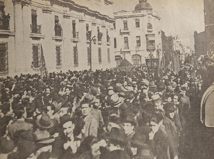 "Con viril entusiasmo todos los gremios obreros , una vez sofocado el intento sedicioso, rinden fervoroso homenaje al excmo. señor Aguirre Cerda". Foto exclusiva de Revista "En Viaje".